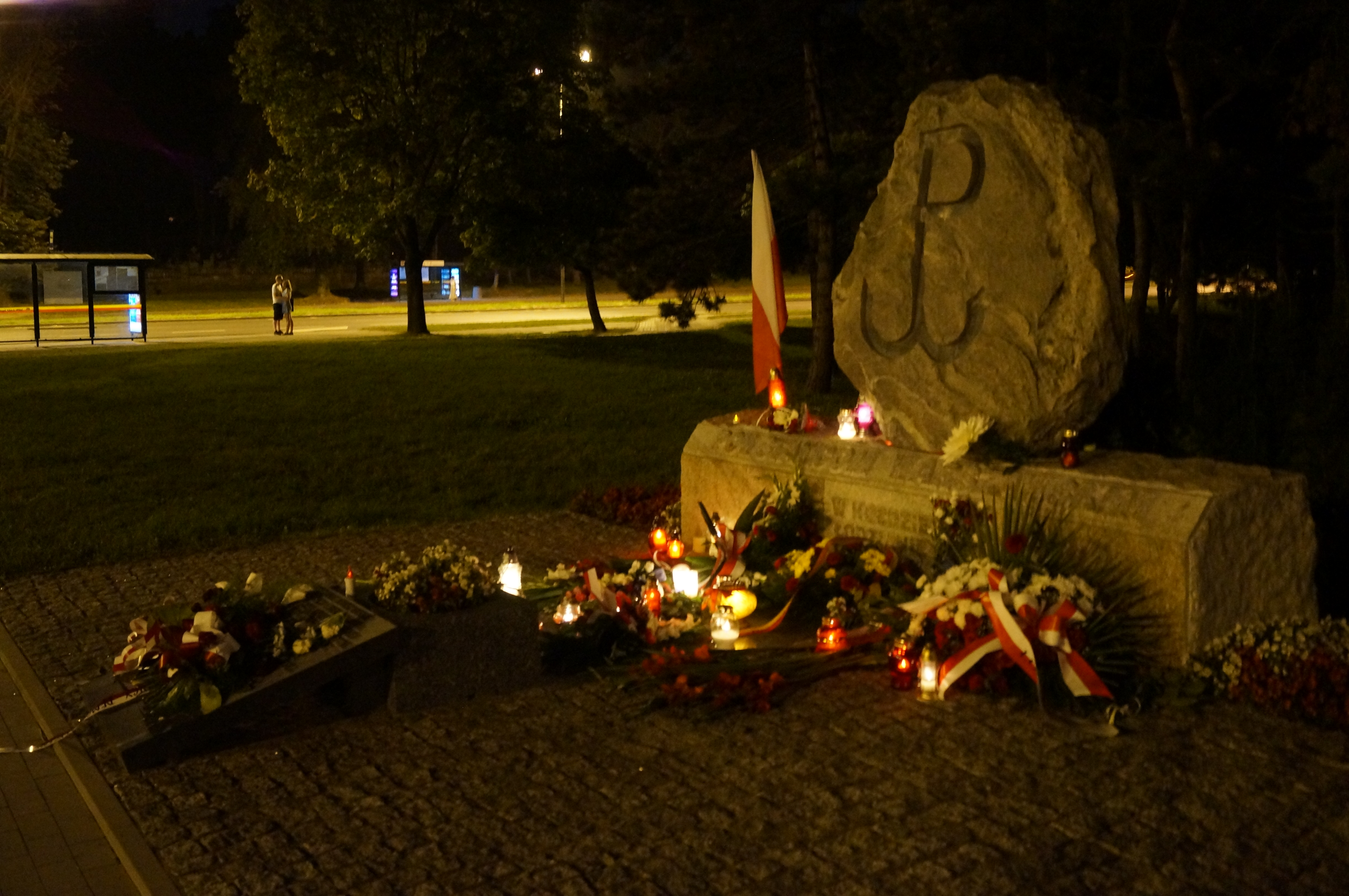 Pomnik Powstańców Warszawskich Michała Gałkiewicza fot. Michał Dondzik